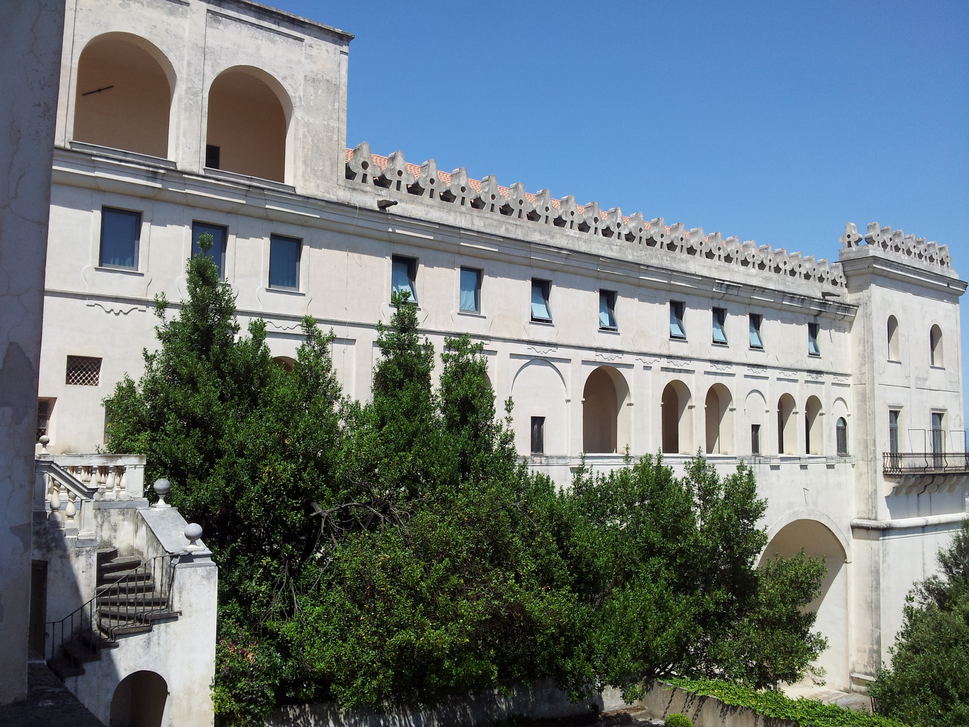 Napoli, Certosa di san Martino: il Quarto del Priore